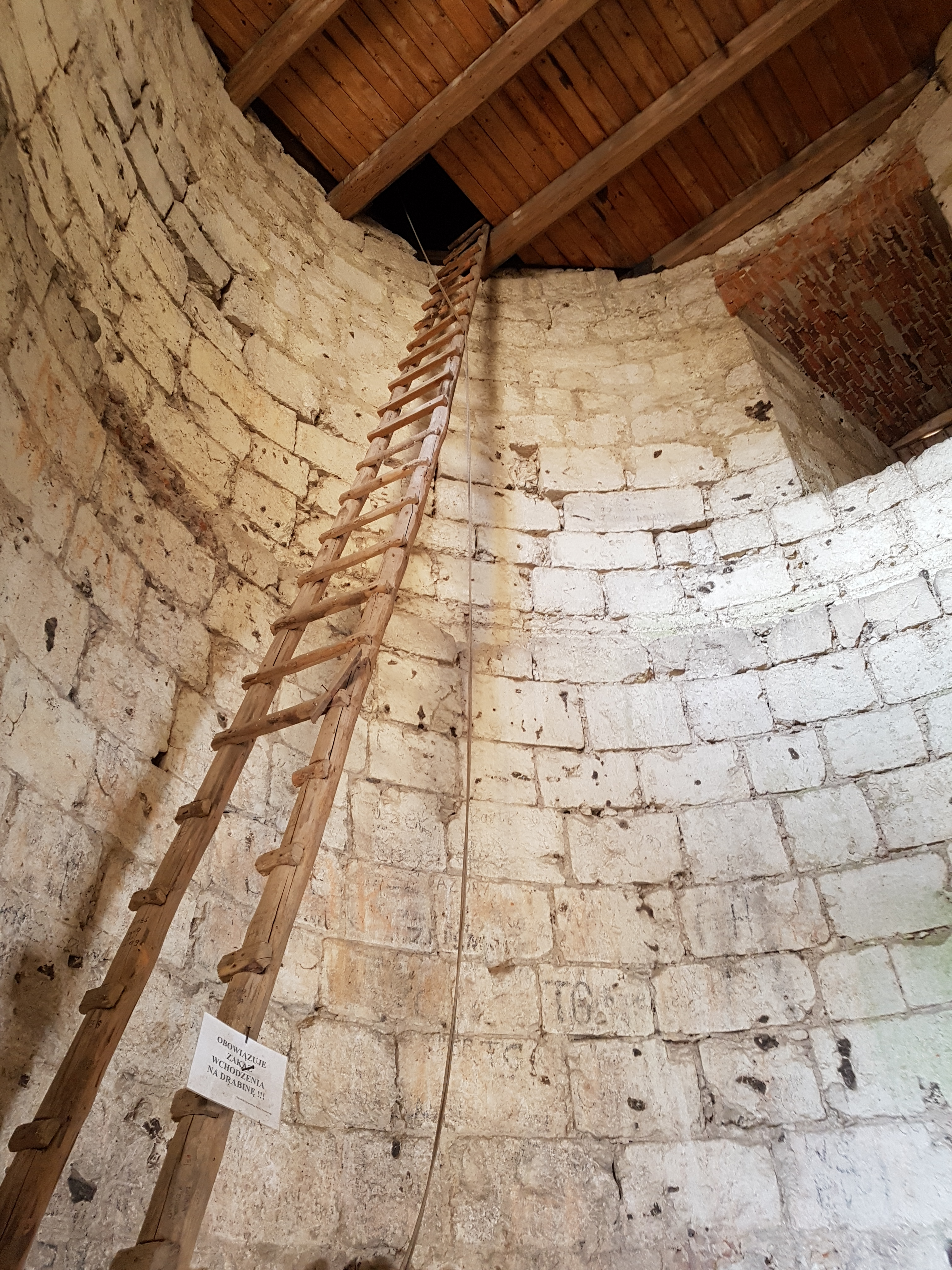 Wnętrze baszty obronnej przed odtworzeniem w 2018 r. wewnętrznych kondygnacji